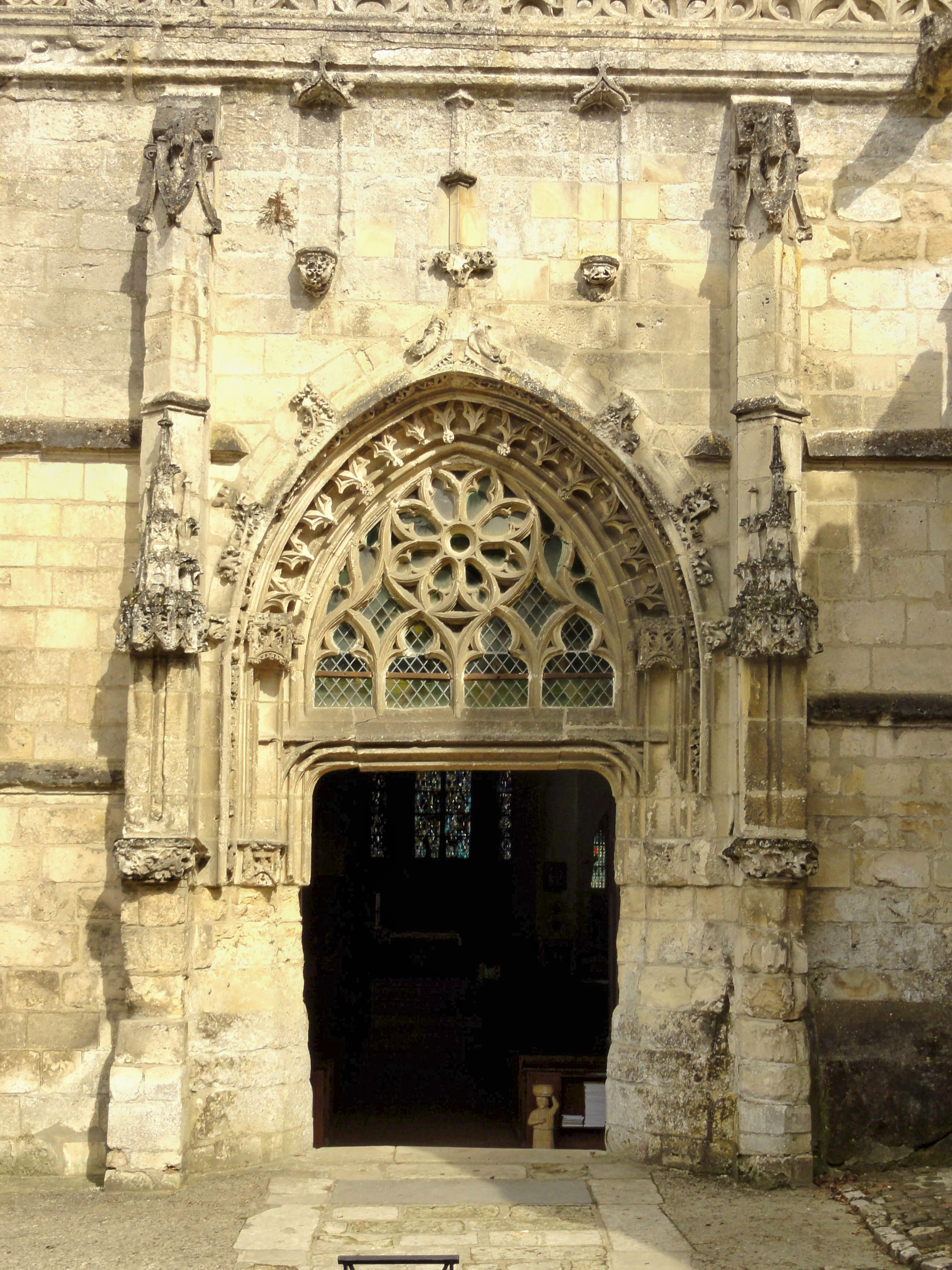 Portail de la nef de droite.